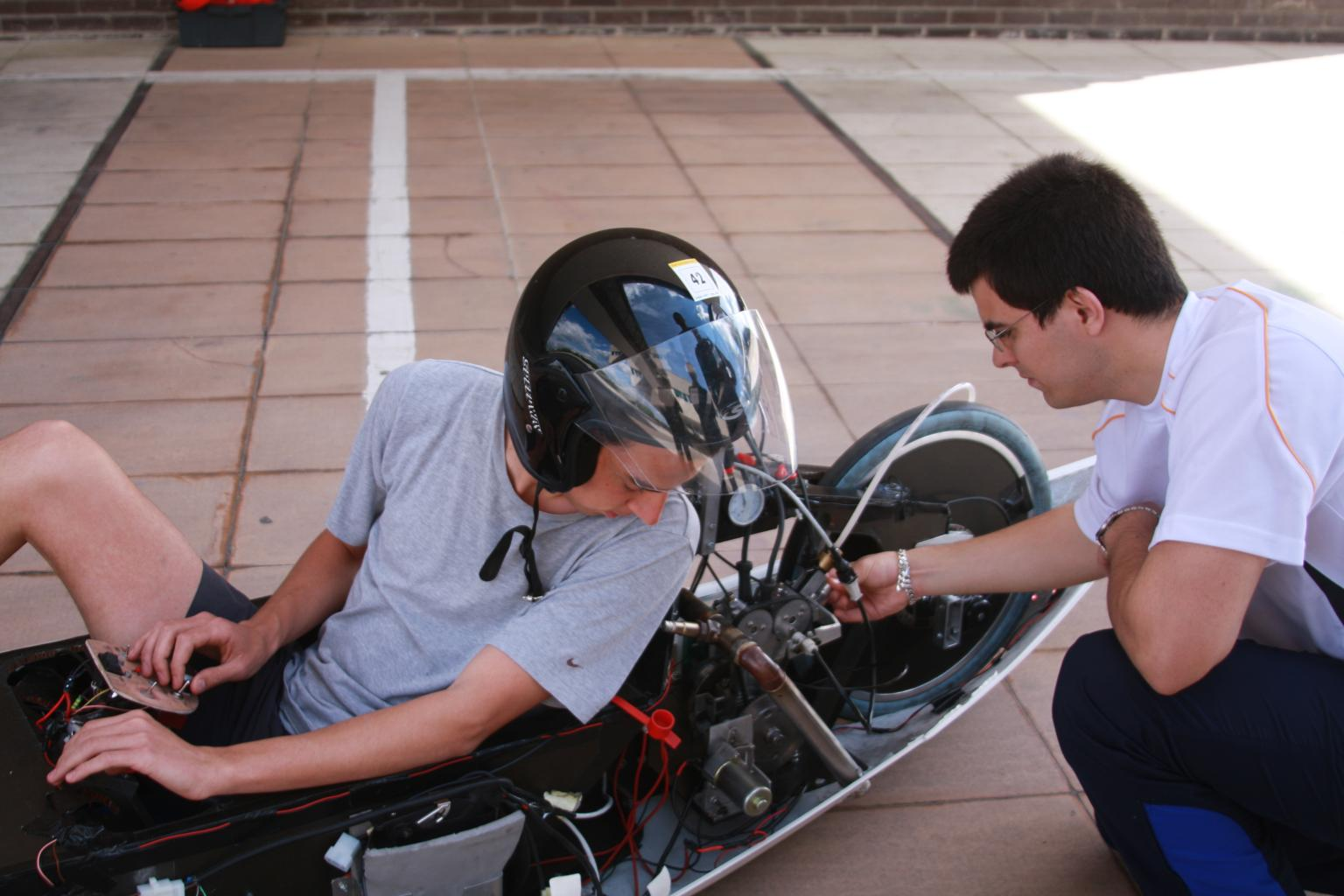 Photo du défi shell eco marathon à l'École polytechnique